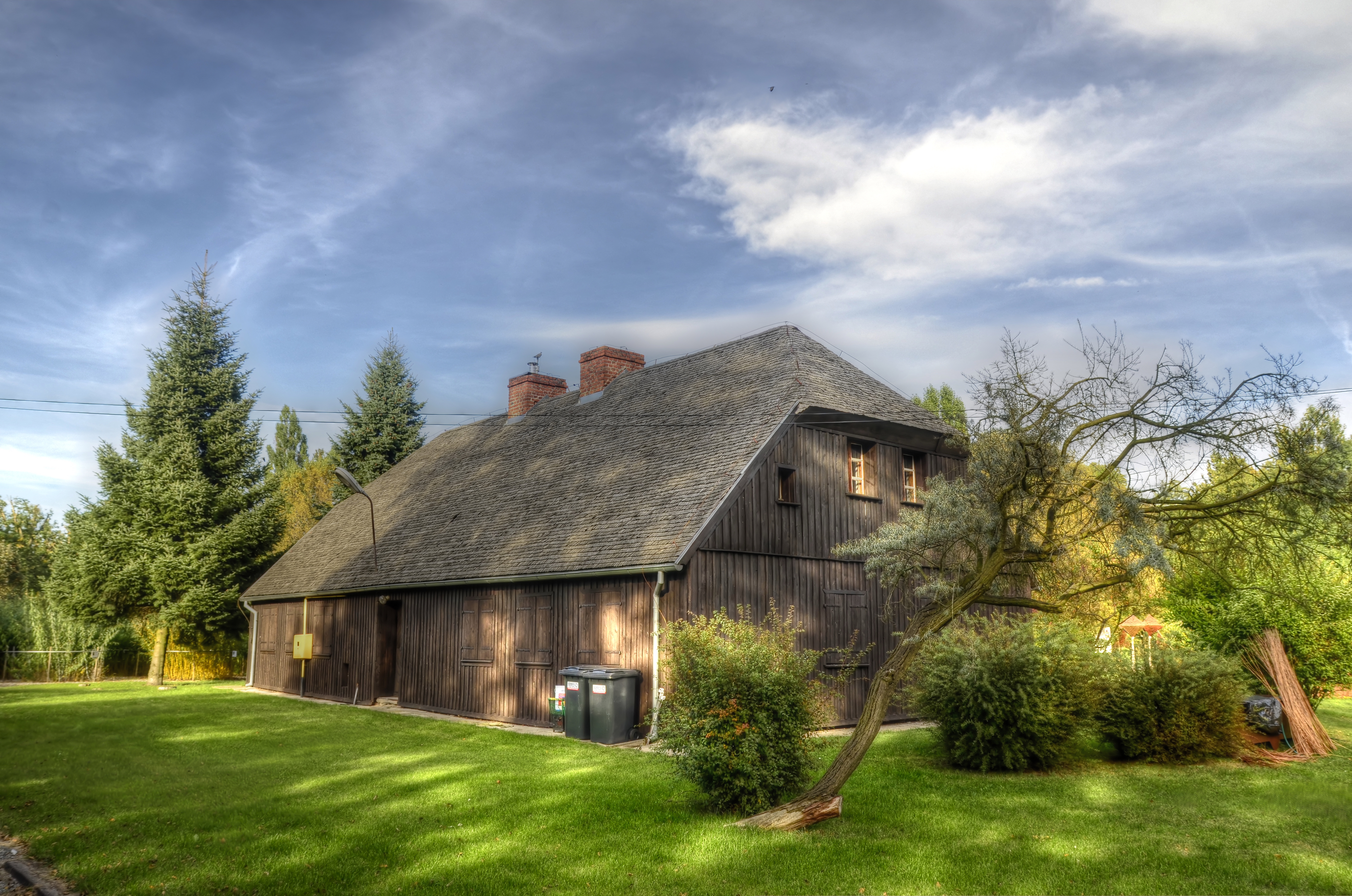 Dom szachulcowy z k. XVIII w. ob. Muzeum Wikliny Nowy Tomyśl, ul. Olchowa 10, Nowy Tomyśl